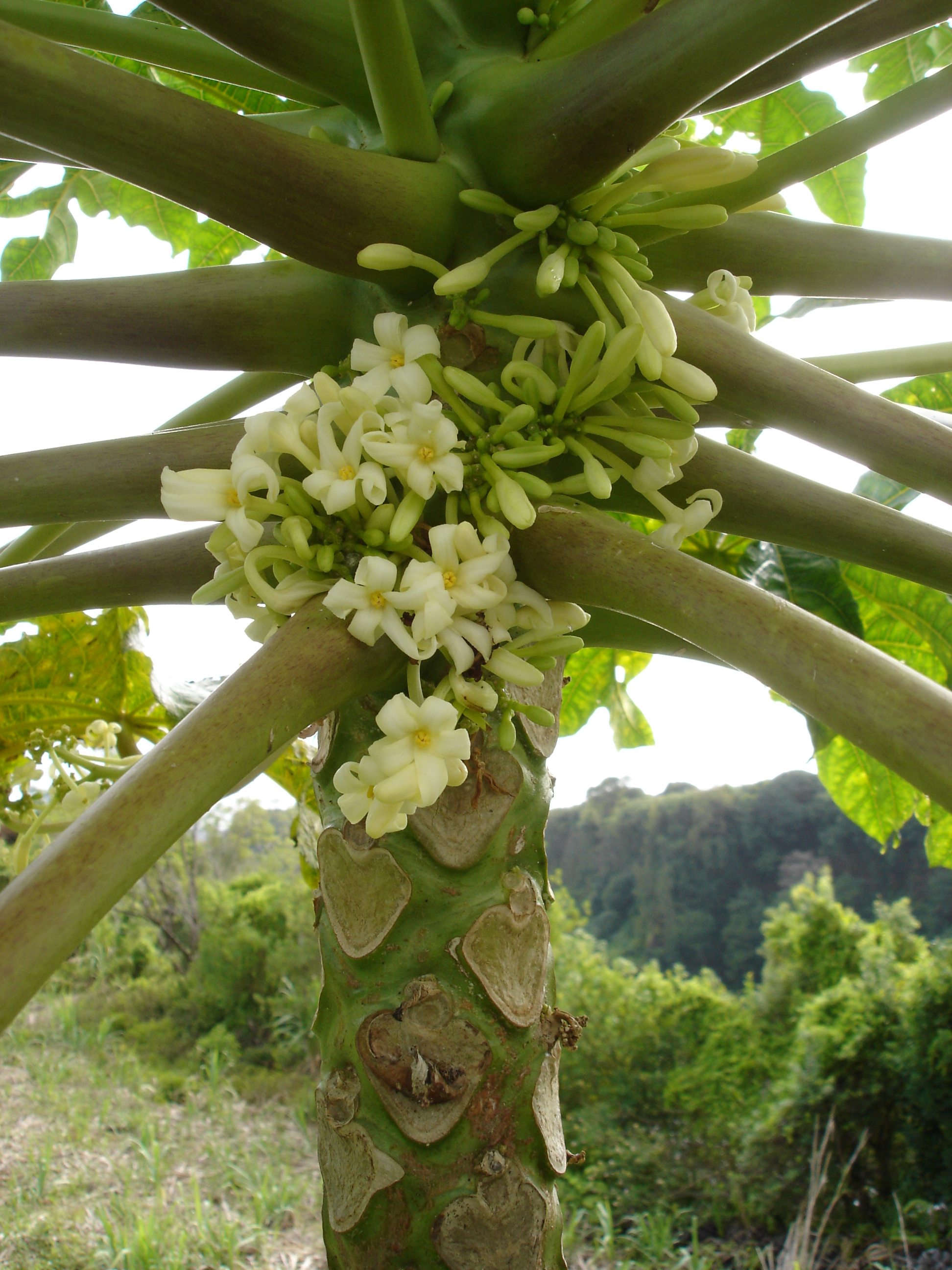 Description: Spécimen mâle de papayer, Carica papaya, novembre 2004, La Réunion Source: Bouba